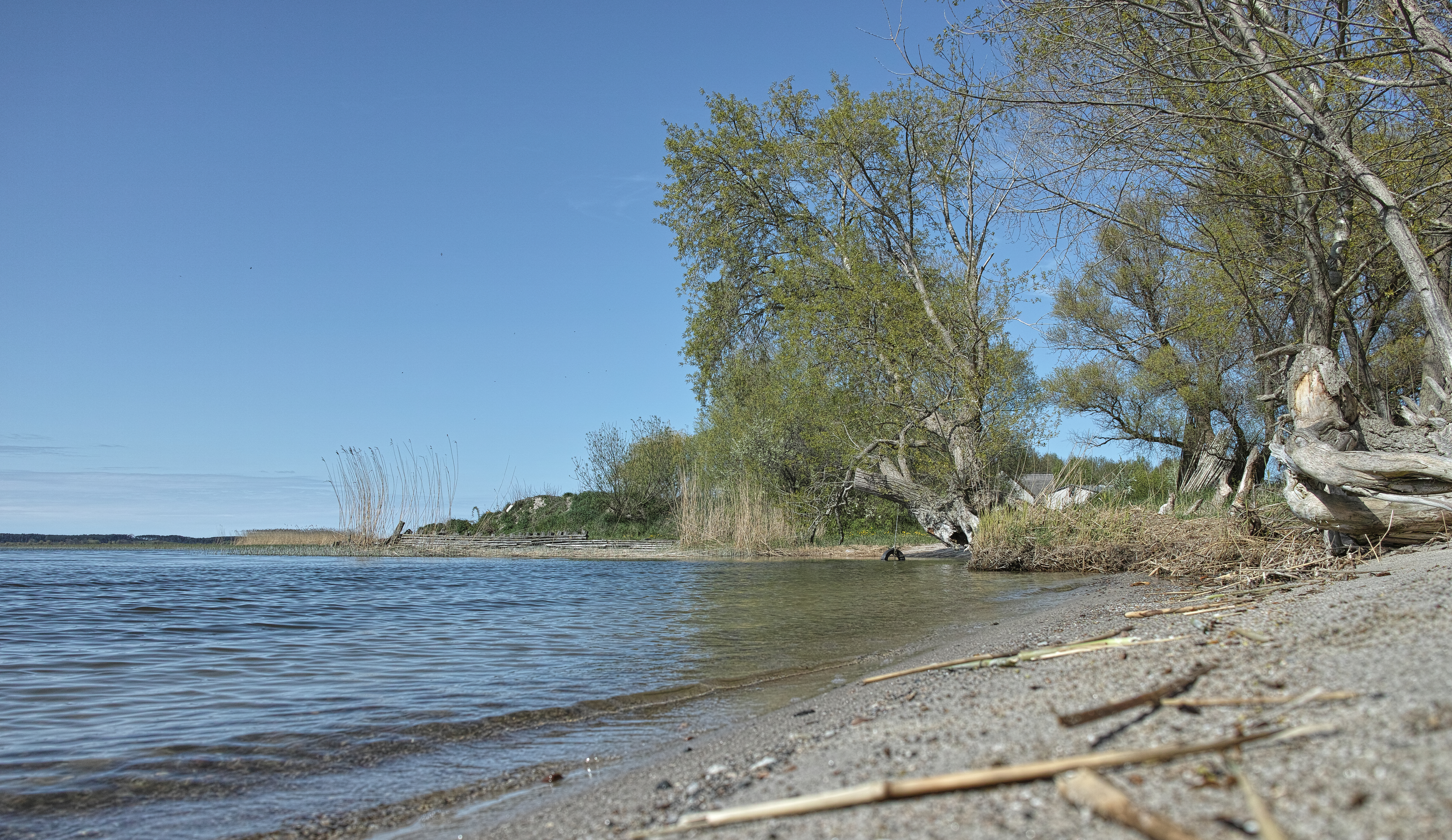 Strand von Warthe im Lieper Winkel Naturpark Insel Usedom